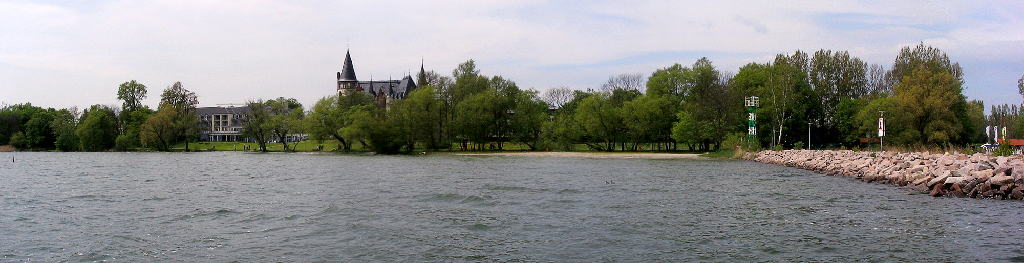 Beschreibung: Hotel Schloss Klink von der Steinmole aus fotografiert als Panorama Fotograf: Darkone, 14. Mai 2005